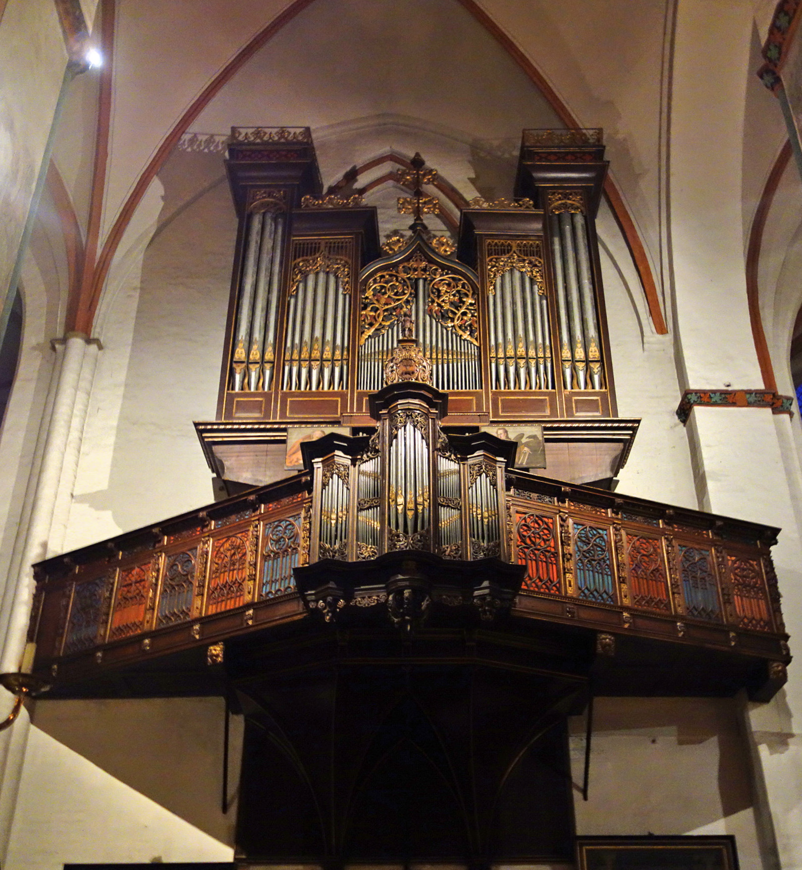 Kleine Orgel der Jakobikirche Lübeck, Schleswig-Holstein, Deutschland